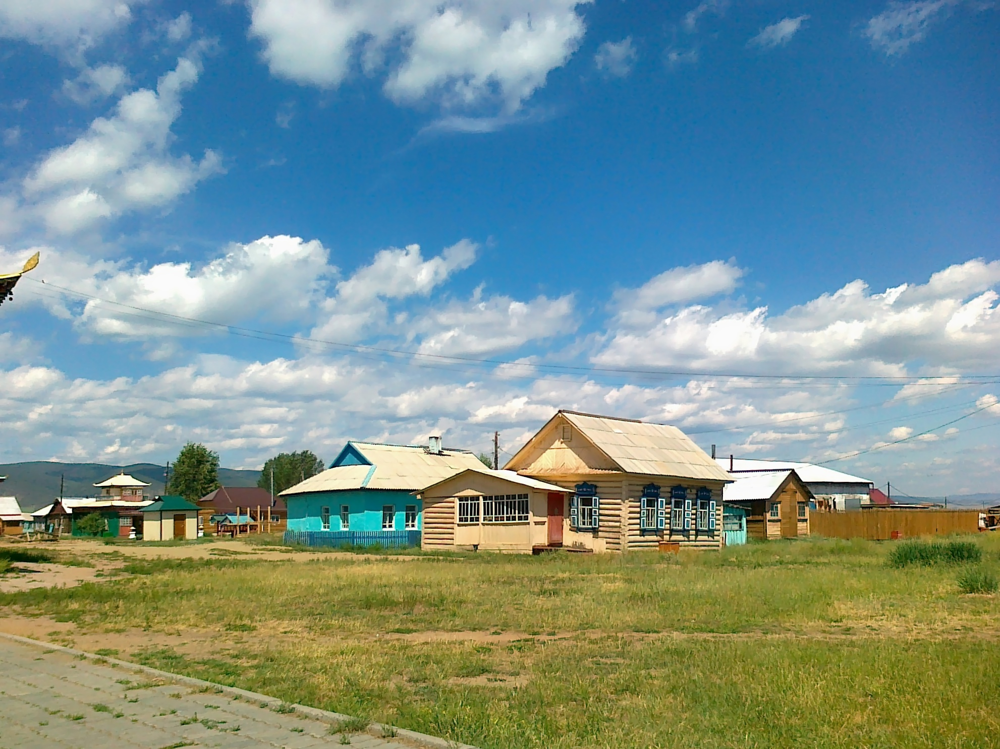 Residential houses of priestesses datsan